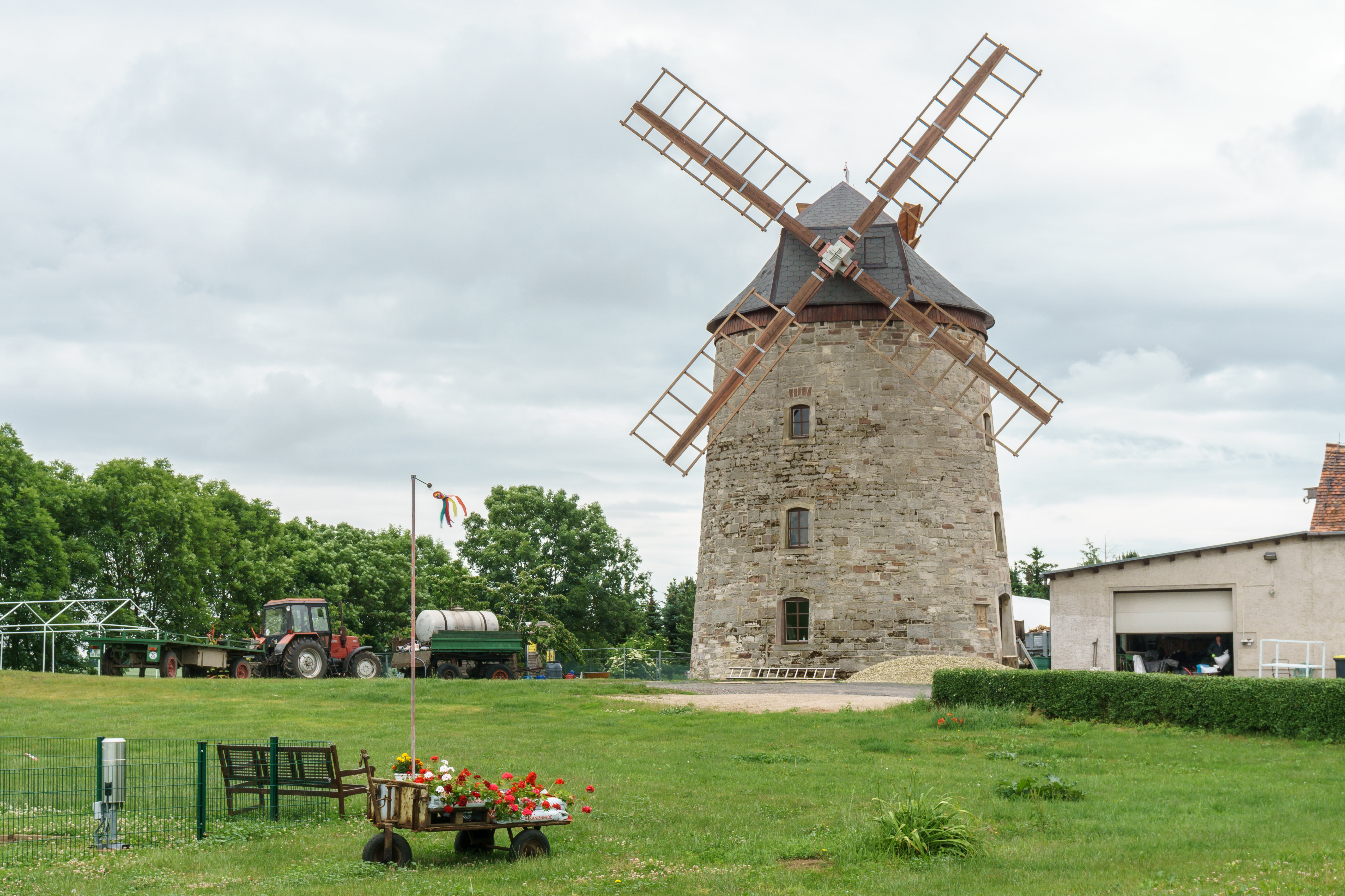 Turmholländermühle in Lodersleben